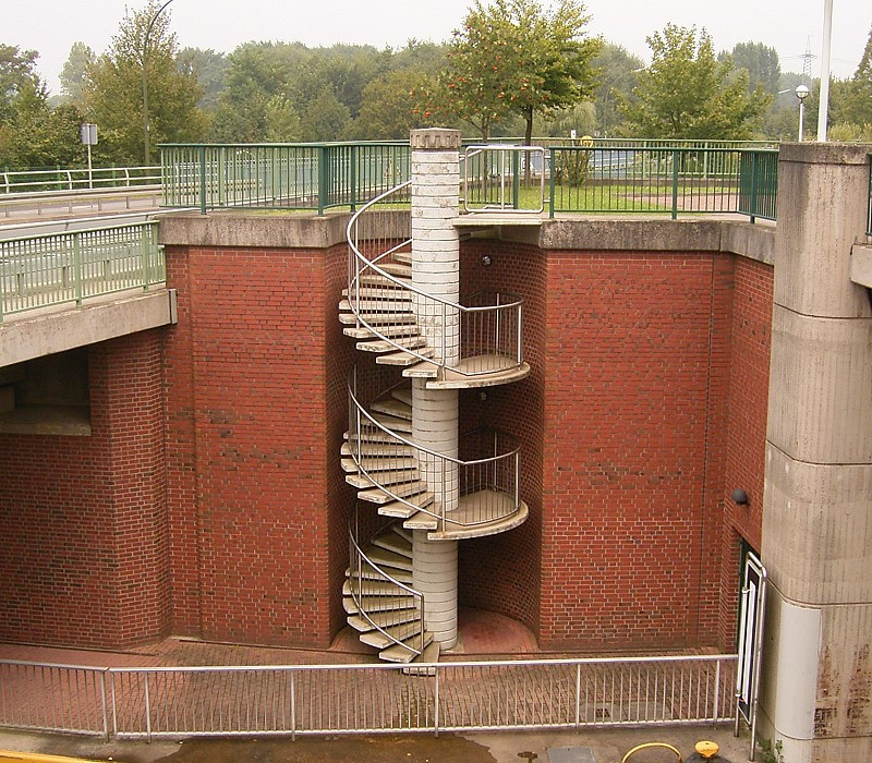 Neues Schiffshebewerk im Schleusenpark Waltrop